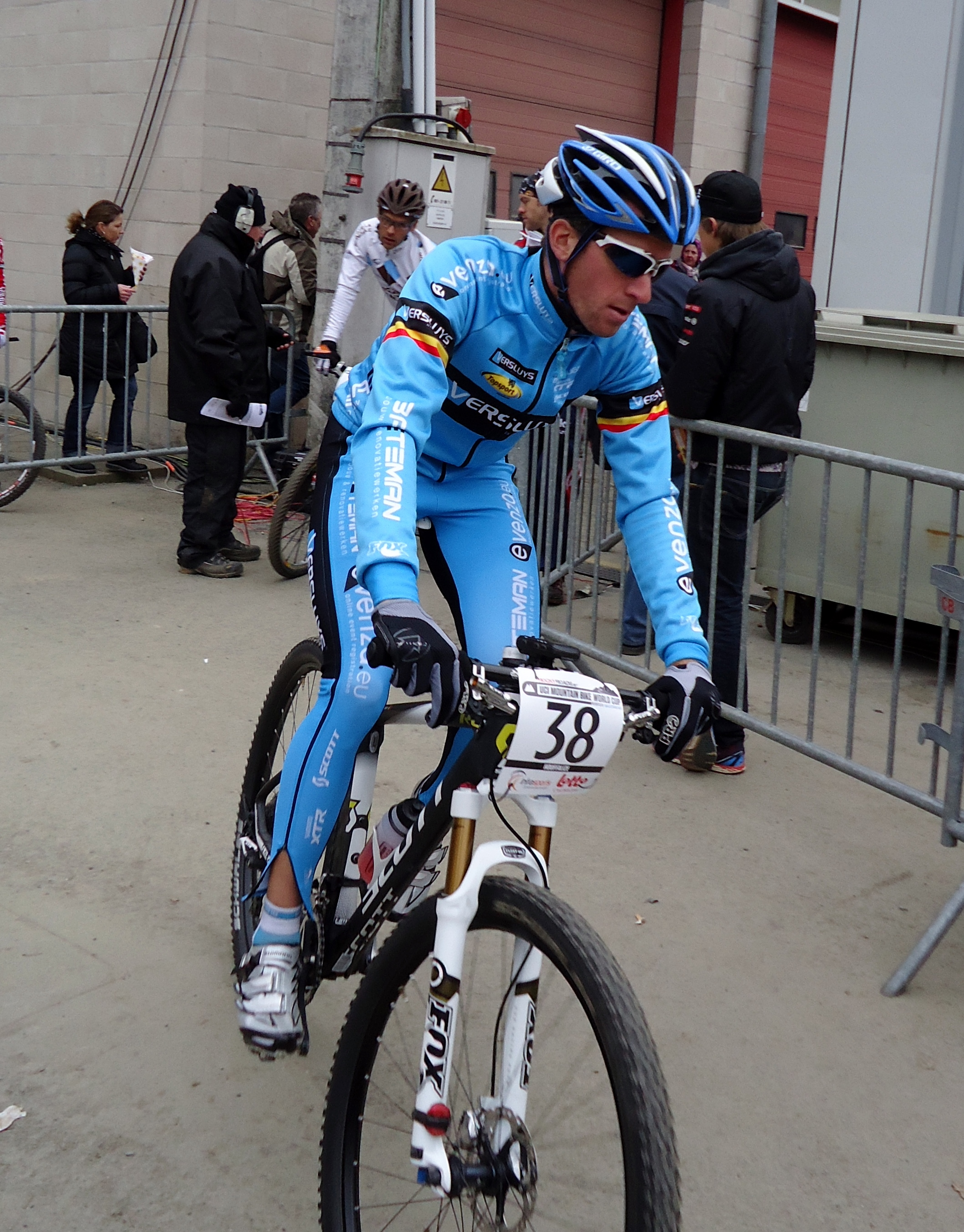 Kevin van Hoovels vlak voor de start World Cup-manche XCO Houffalize (BEL).